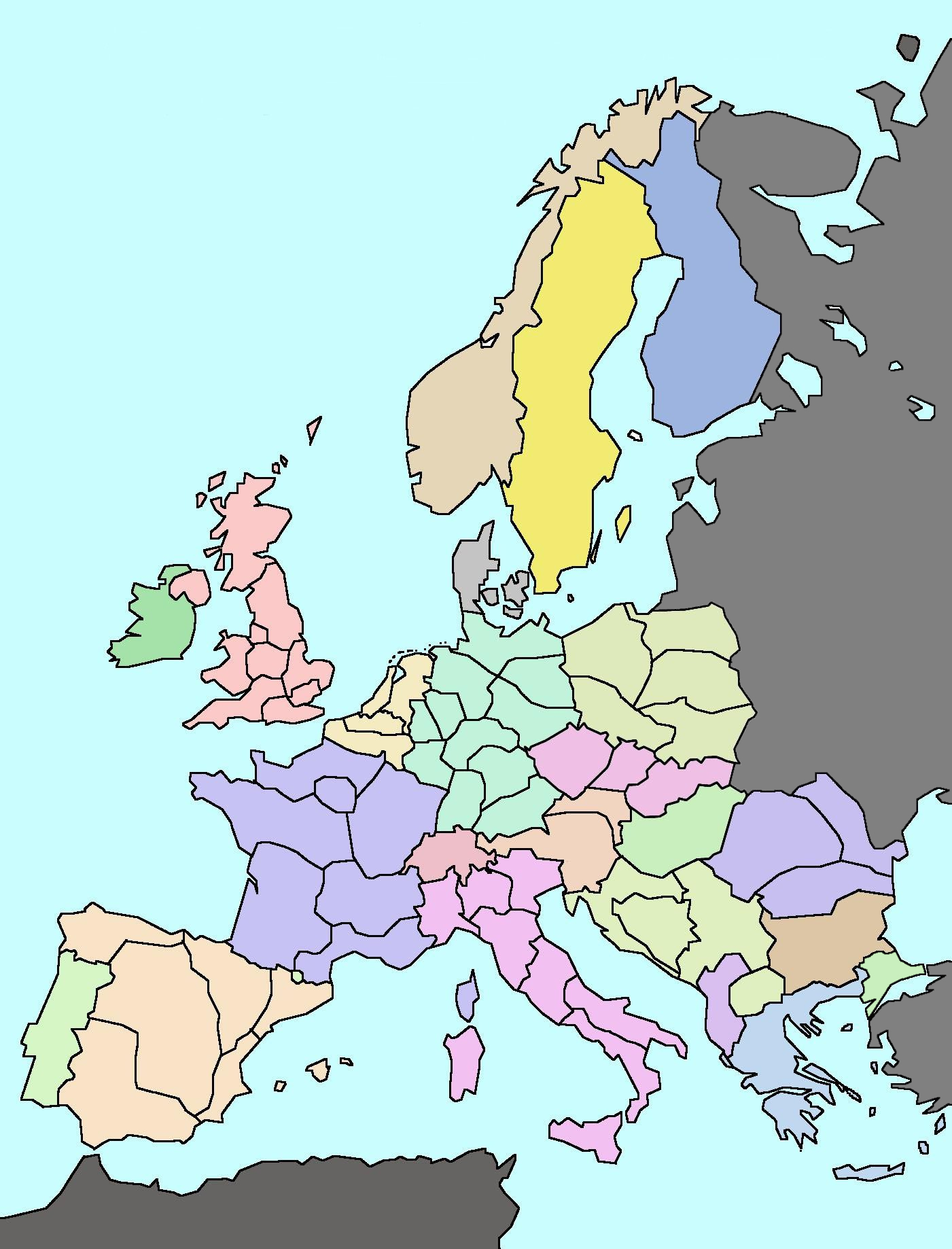 Die 75 Regionen Europas nach den Vorstellungen von Heineken. Veröffentlicht 1992.